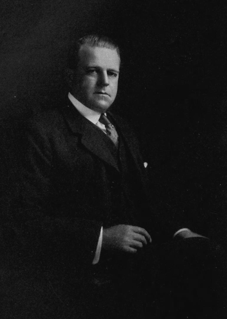 Edward A. McIlhenny